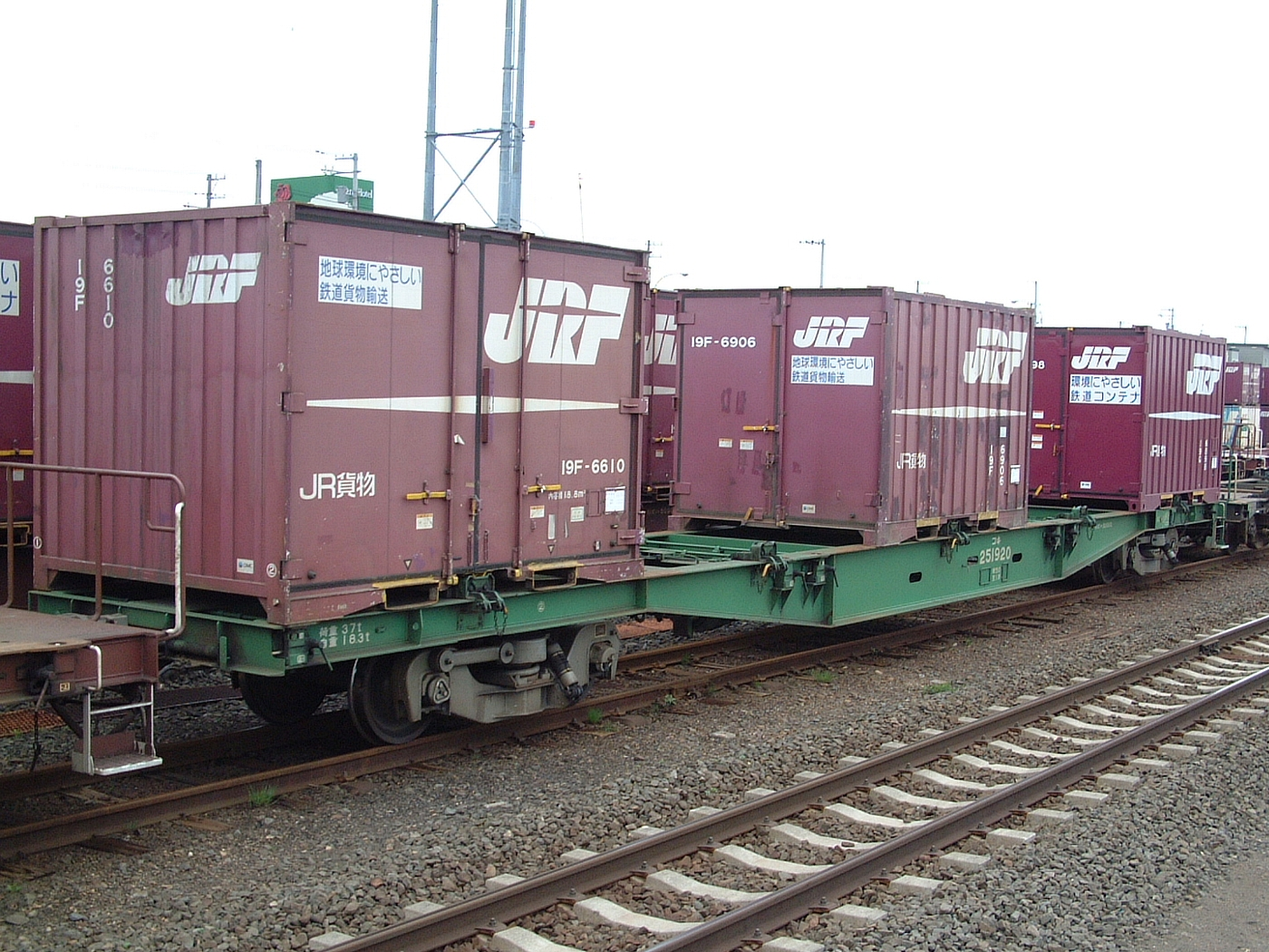 JR貨物コキ50000形コンテナ車（コキ251920） JR北海道根室本線新富士駅で撮影